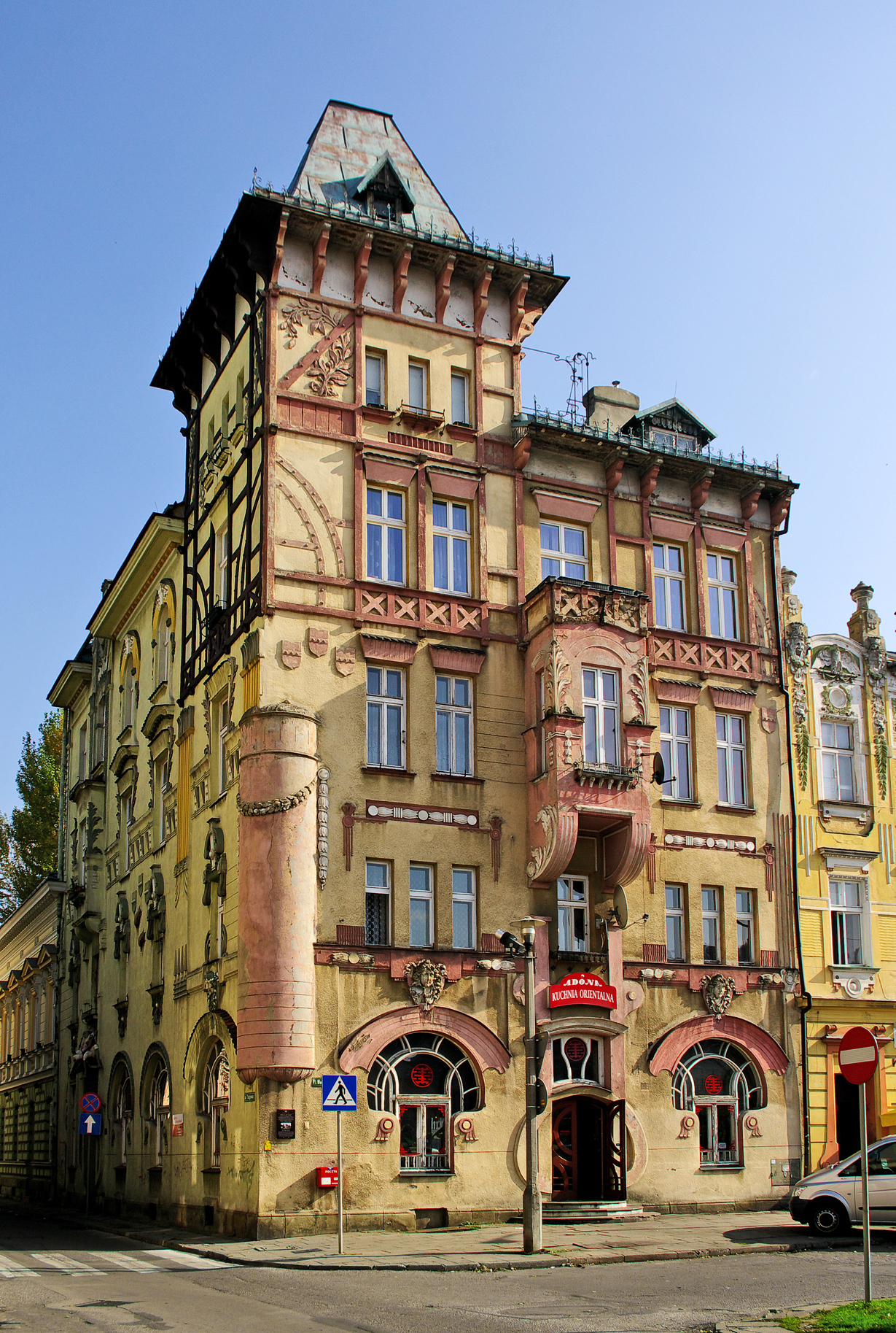 Secesyjna "Kamienica Pod Żabami"